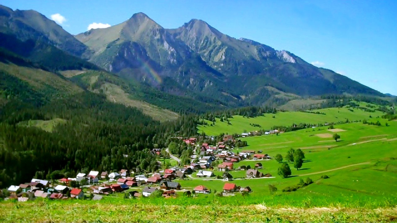 Zdziar i Tatry Bielskie (widok z Doliny Blaszczadzkiej)